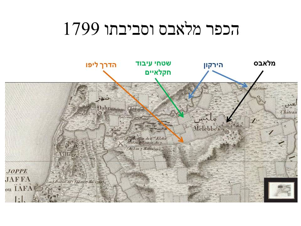 הכפר מלאבס וסביבתו בשנת 17999